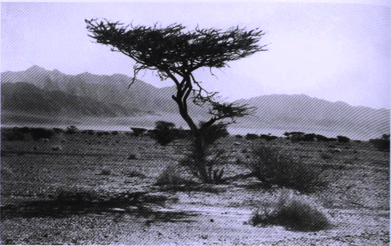 נוף באזור אילת, 1950, על ידי זולטן קלוגר, ארכיון קק"ל.